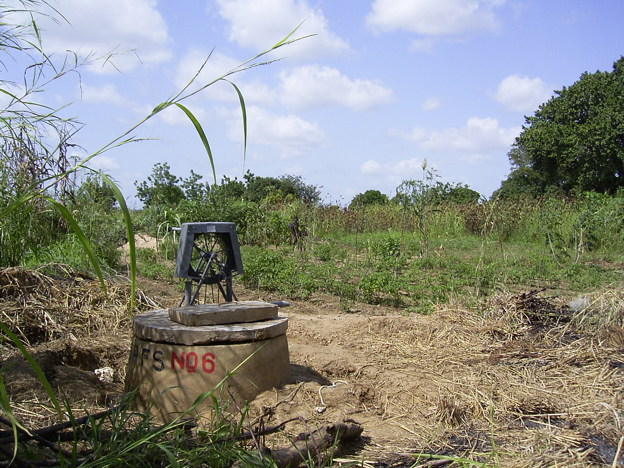 Touwpomp model "Victory Pump" op de savanne bij Paga, Upper East Region, Ghana. Deze is vervaardigd door Yamisa Enterprise uit Bolgatanga. Foto: Rene Schuirink